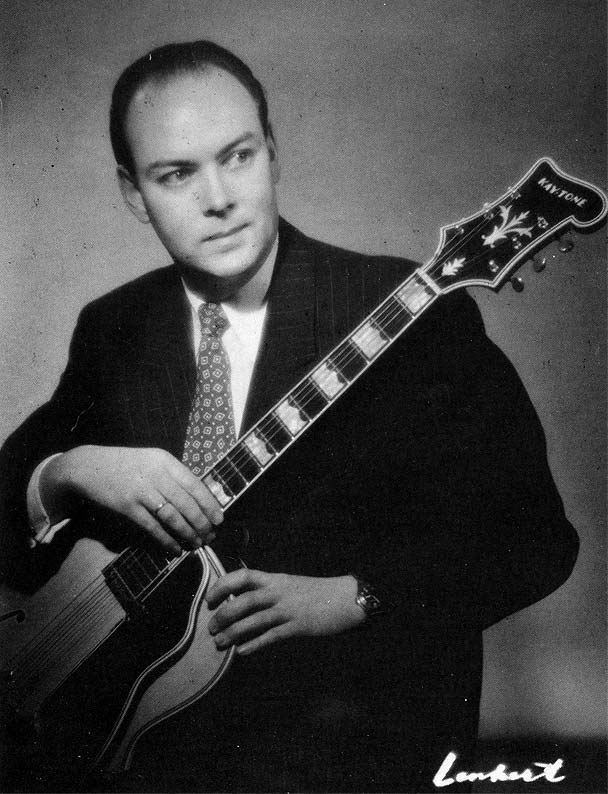 Sven Stiberg